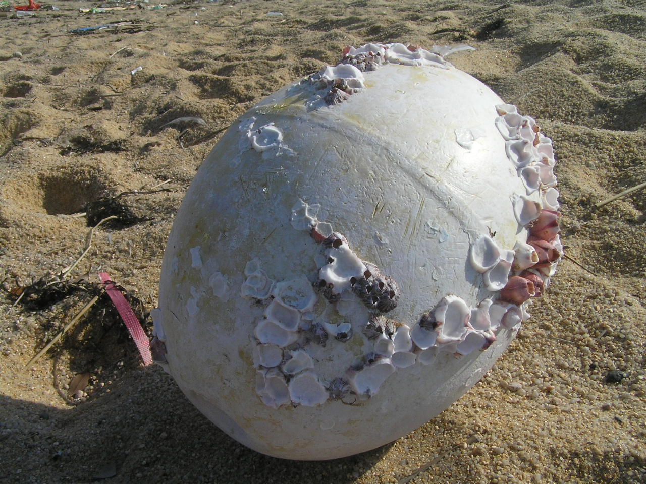 漂流物･ブイ京都府島影